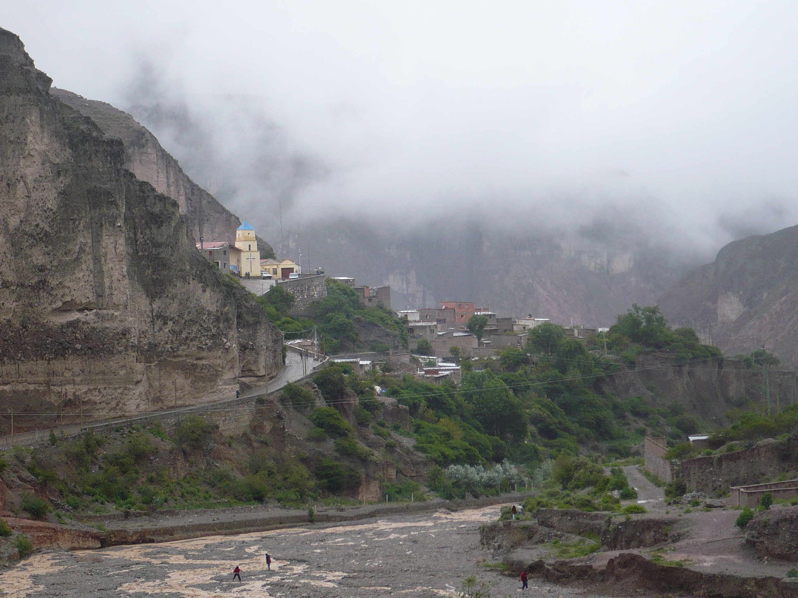 Vista desde 1 km de distancia aproximadamente de Iruya, en Salta, Argentina